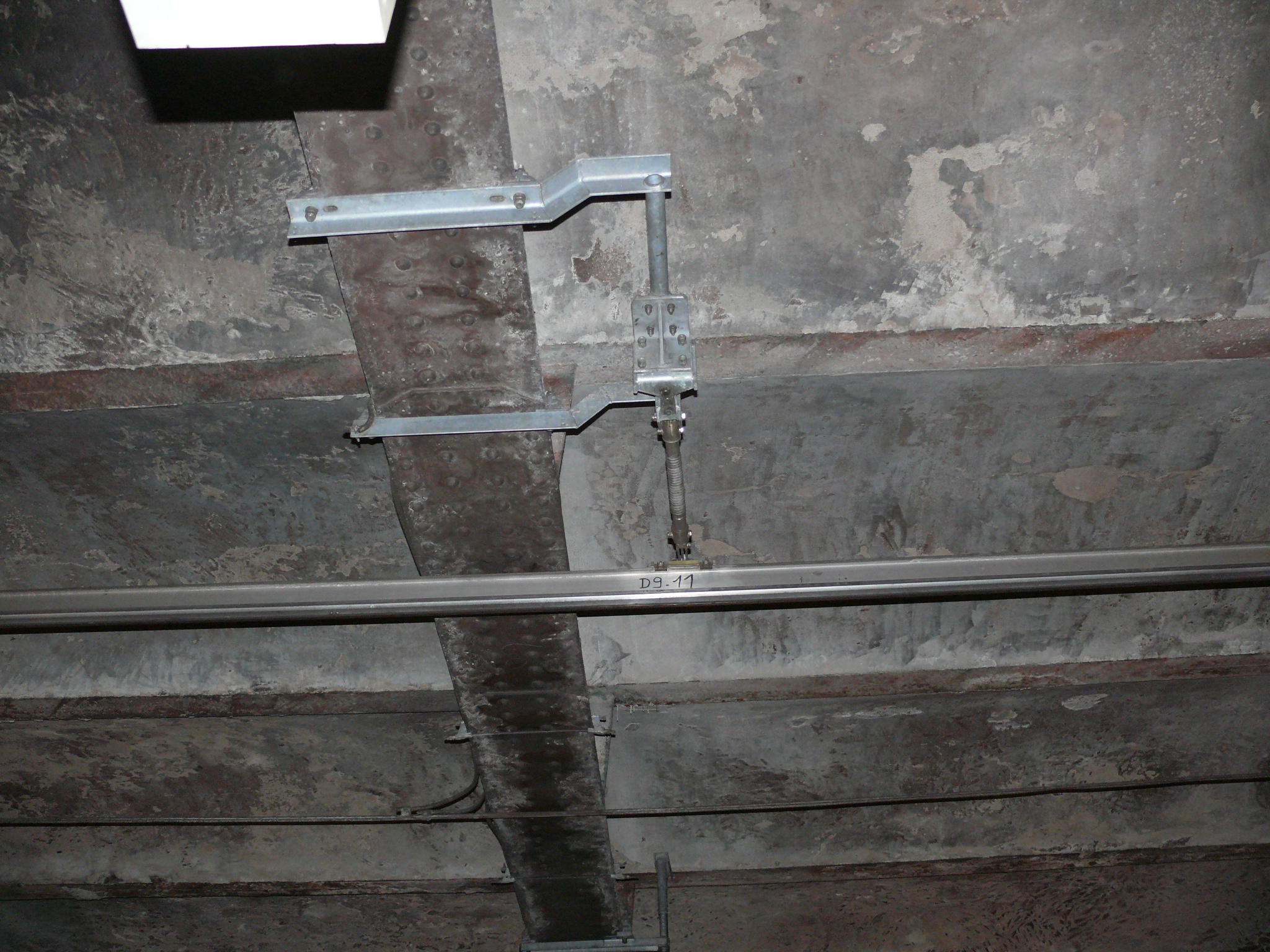 Rail aérien de contact à Paris - Gare d'Orday